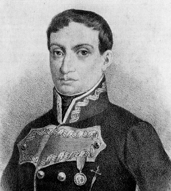 Mariano Álvarez de Castro portrait